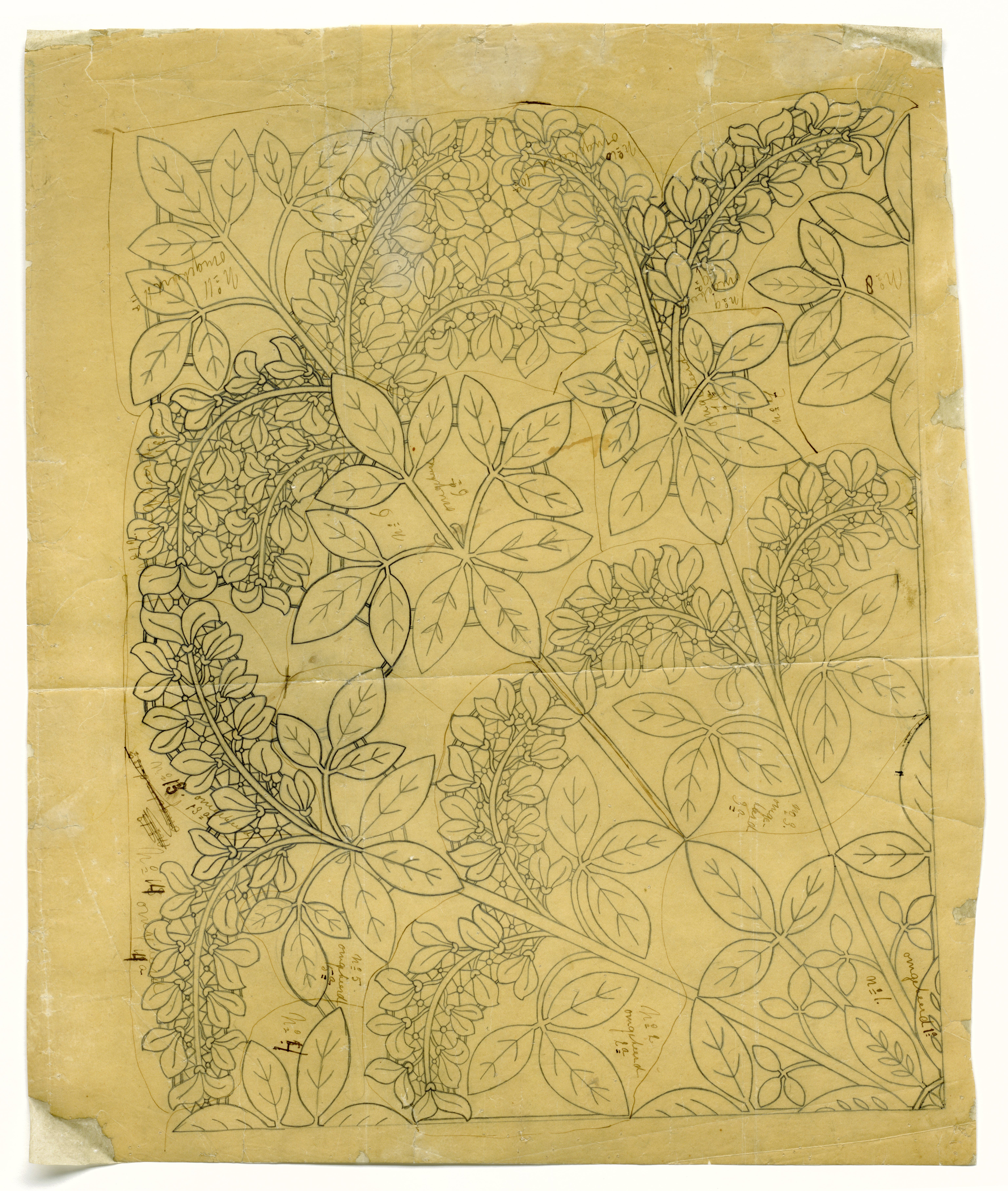 IdentificatieTitel(s): Ontwerptekening op calqueerpapier voor een kleed van kloskant met goudenregentakken en -bloemenObjecttype: gereedschap ontwerptekening Objectnummer: BK-1979-84-A-1Omschrijving: Ontwerptekening op calqueerpapier voor een kleed van kloskant: duchesse-kant. Het ontwerp met goudenregenmotief is gemaakt door mevrouw Van der Meulen-Nulle. Zie ook de bijbehorende prikpatronen en het gekloste kleed, uitgevoerd door mevrouw Bloemink-van Baeren.VervaardigingVervaardiger: ontwerper: Louise Wilhelmina van der Meulen-NullePlaats vervaardiging: ApeldoornDatering: ca. 1912Fysieke kenmerken: calqueerpapier, potlood, inktMateriaal: papier tekening: potlood aanwijzingen: inkt Techniek: tekenenAfmetingen: l 55 cm. × b 46 cm. Verwerving en rechtenCredit line: Schenking van de Vereniging Het KantsaletVerwerving: schenking 1979Copyright: Publiek domein